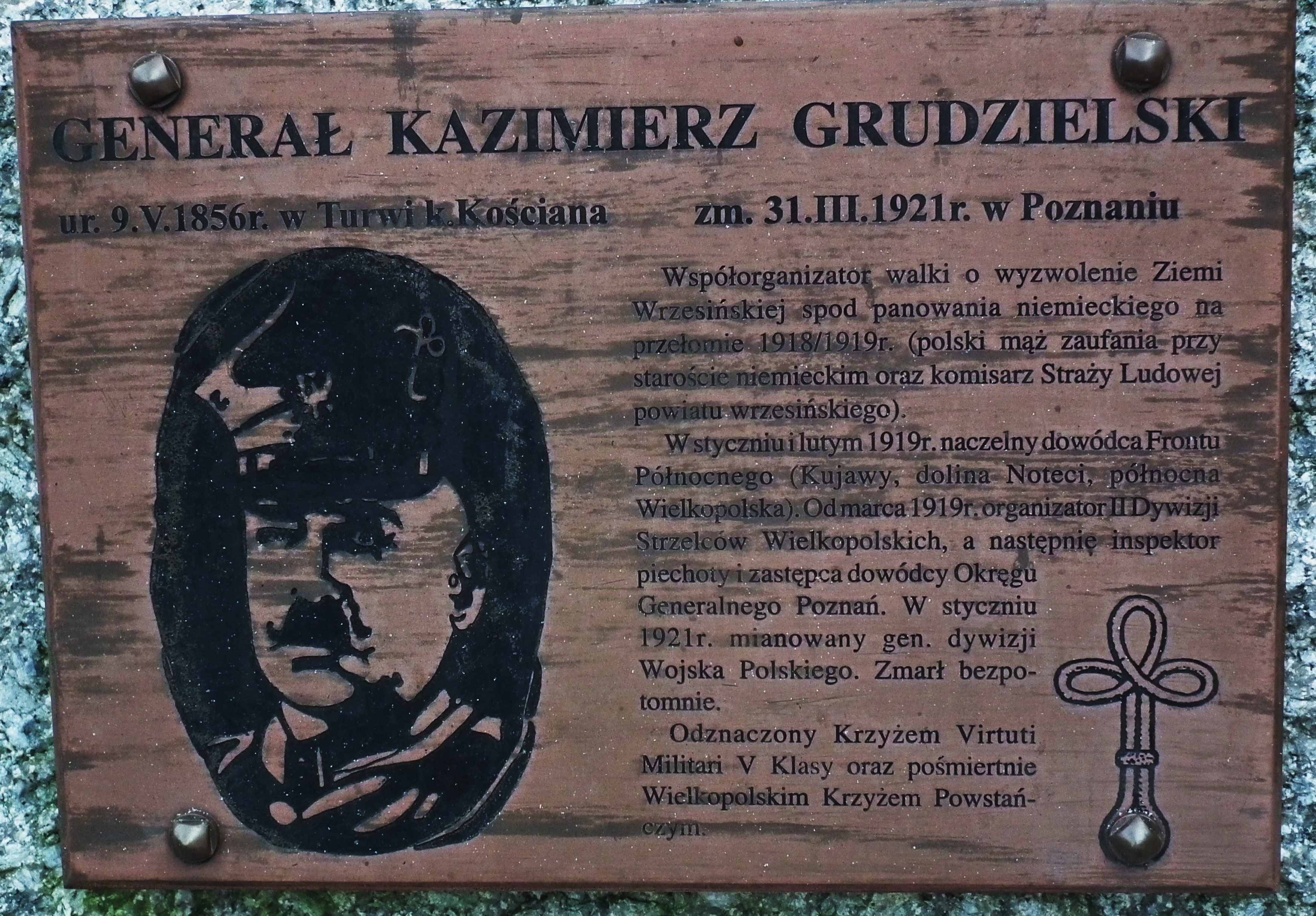 Kościół w Gozdowie, tablica ku czci gen. Kazimierza Grudzielskiego.